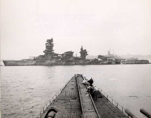 Nagato nearby bikini atoll, july 1946